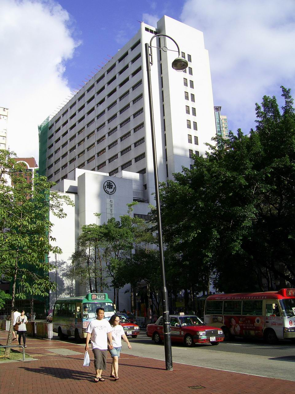 中文（香港）: 仁濟醫院服務大樓